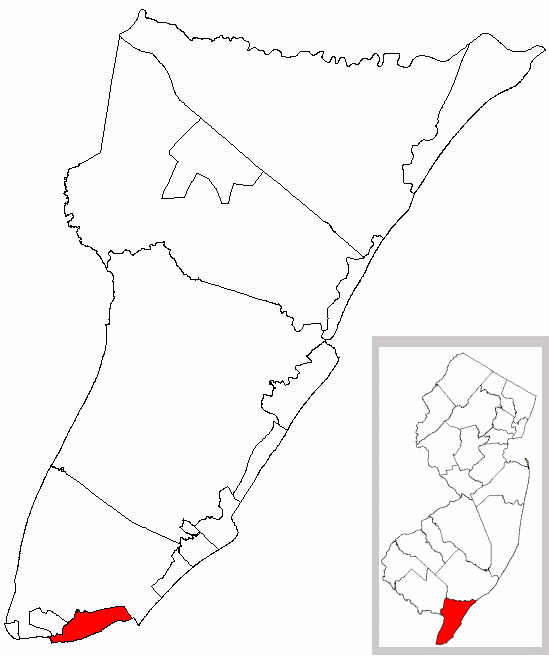 Lage von Cape May, New Jersey, USA